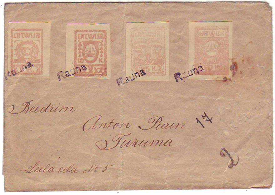 Фантастический выпуск от имени Латвии